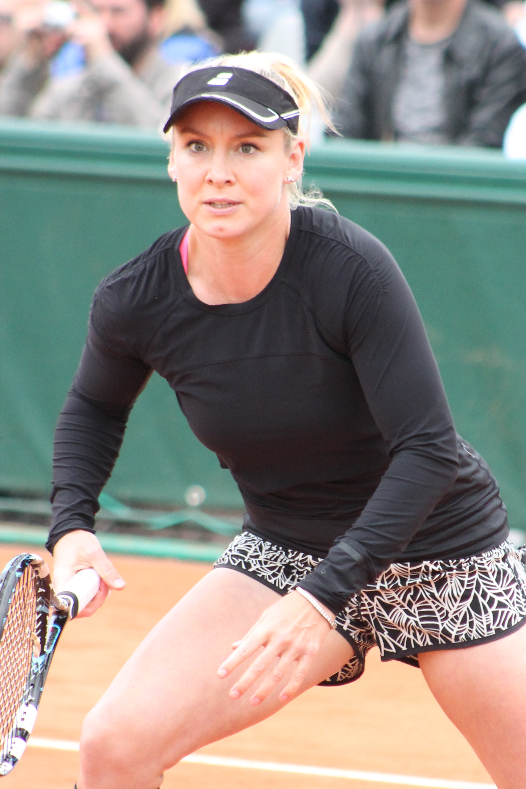 Mattek Sands RG15 (20)